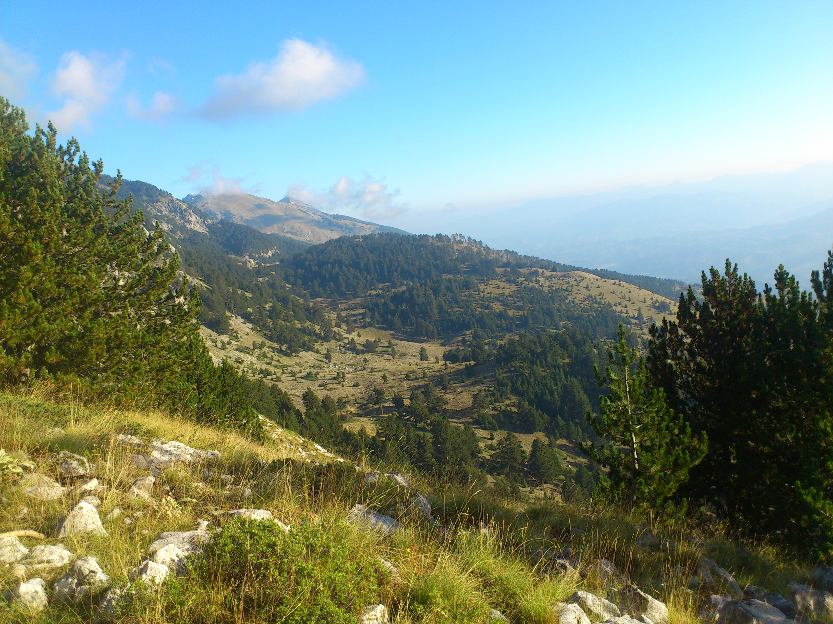 Mali i Tomorrit, Berat, Skrapar, Gramsh